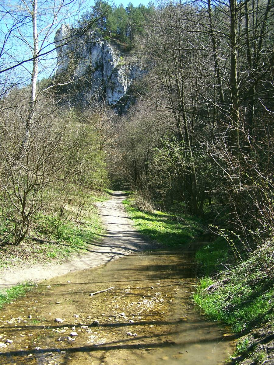 Dolina Kobylańska (Dolinki Krakowskie)